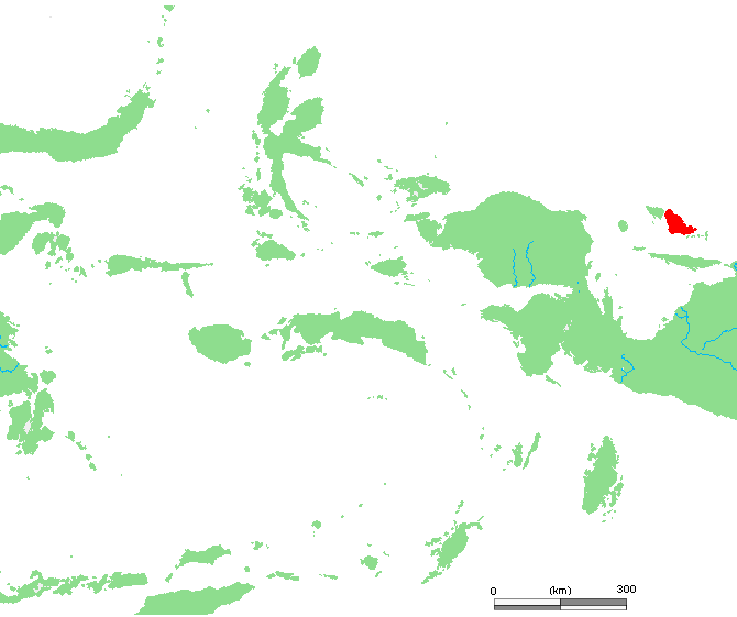 ID Biak.PNG